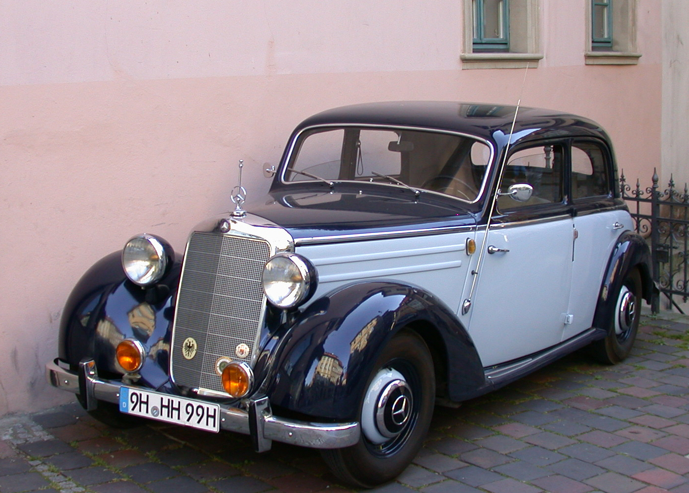 Oldtimer MB 170 S für den Strassenverkehr zugelassen ( Kennzeichen geändert - nur das letzte H ist geblieben)